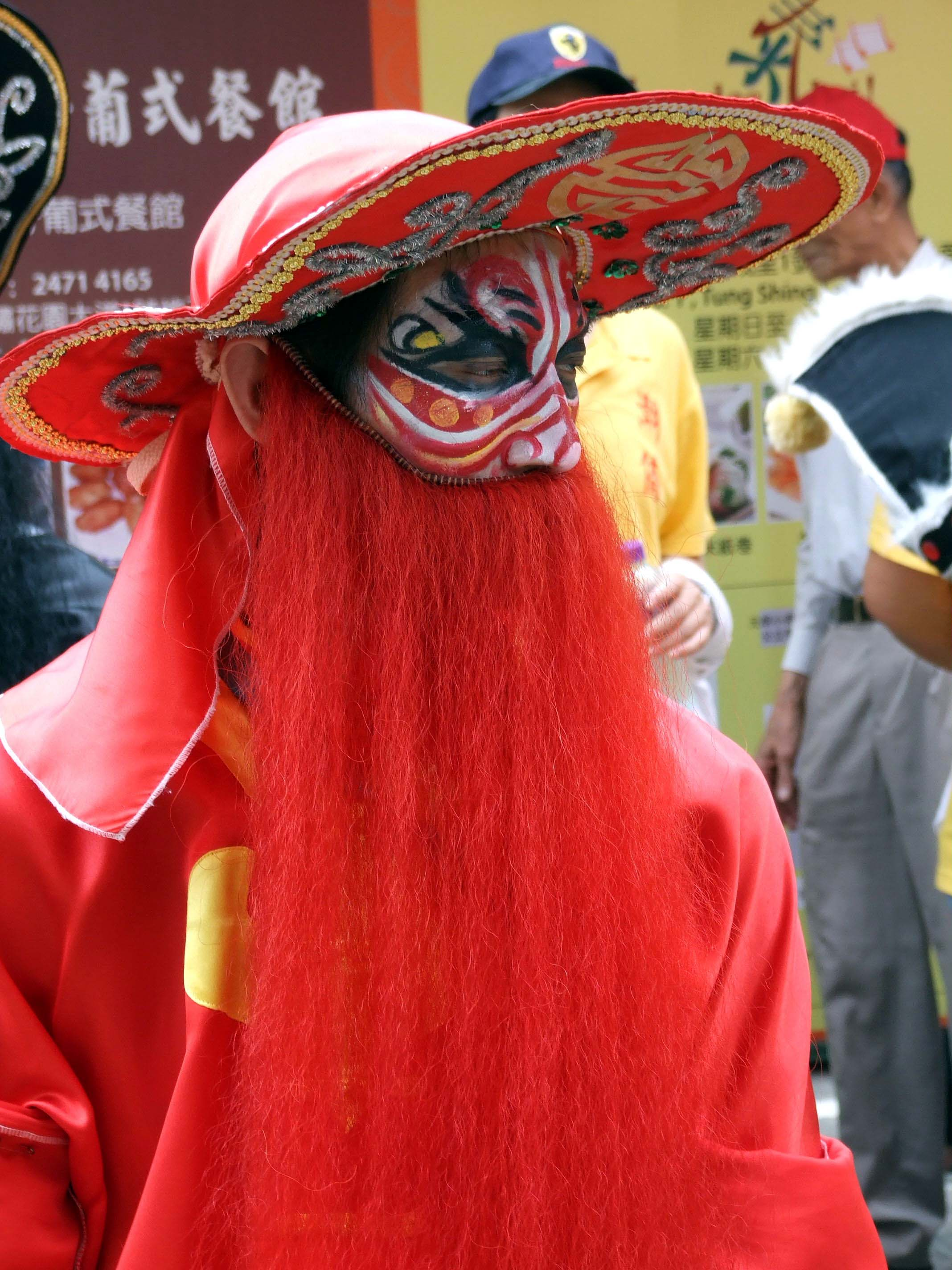 英歌红面红须的“头槌”脸谱